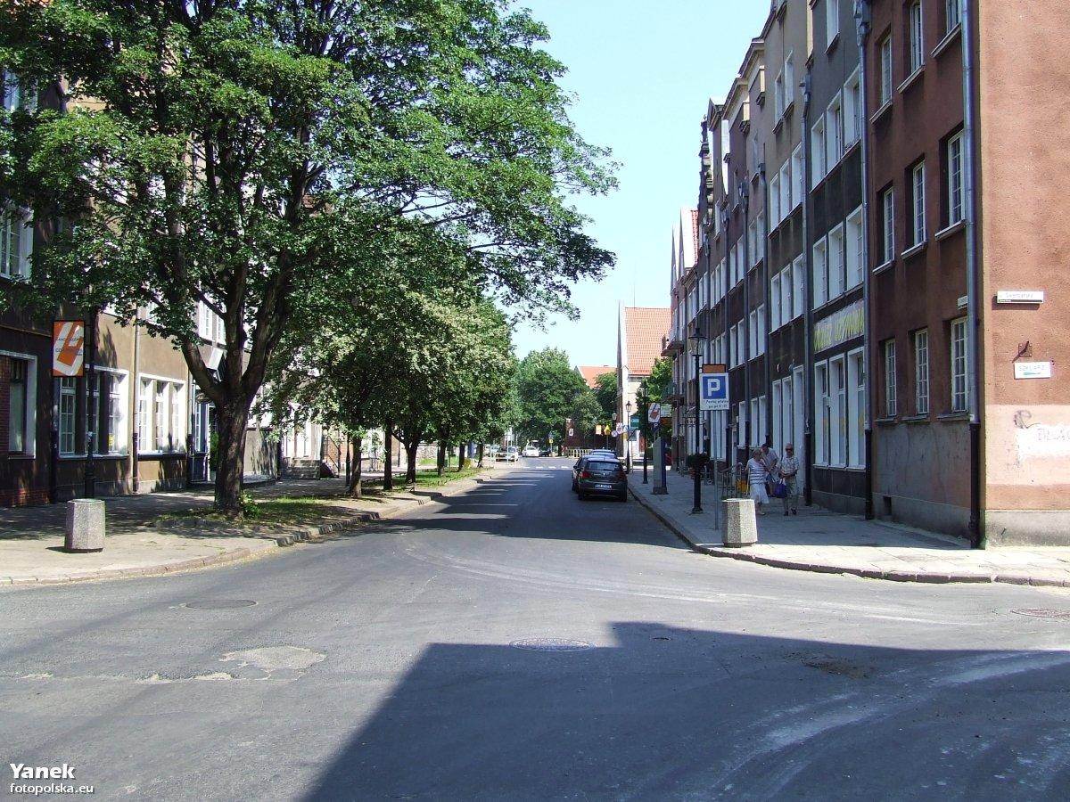 Od ul. Grobla II i ul. Straganiarskiej w kierunku Starego Miasta